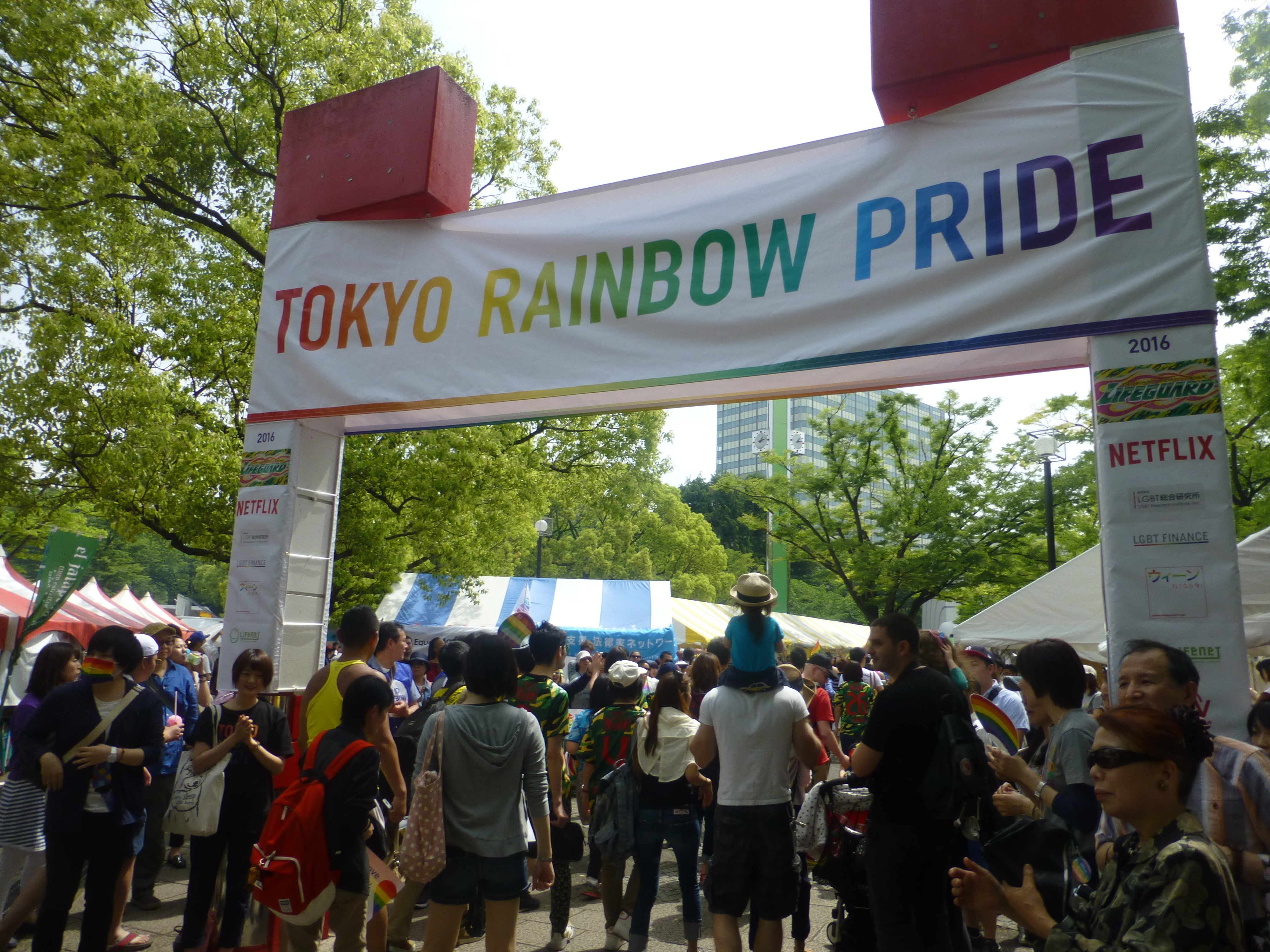 東京レインボープライド（とうきょうレインボープライド, Tokyo Rainbow Pride)